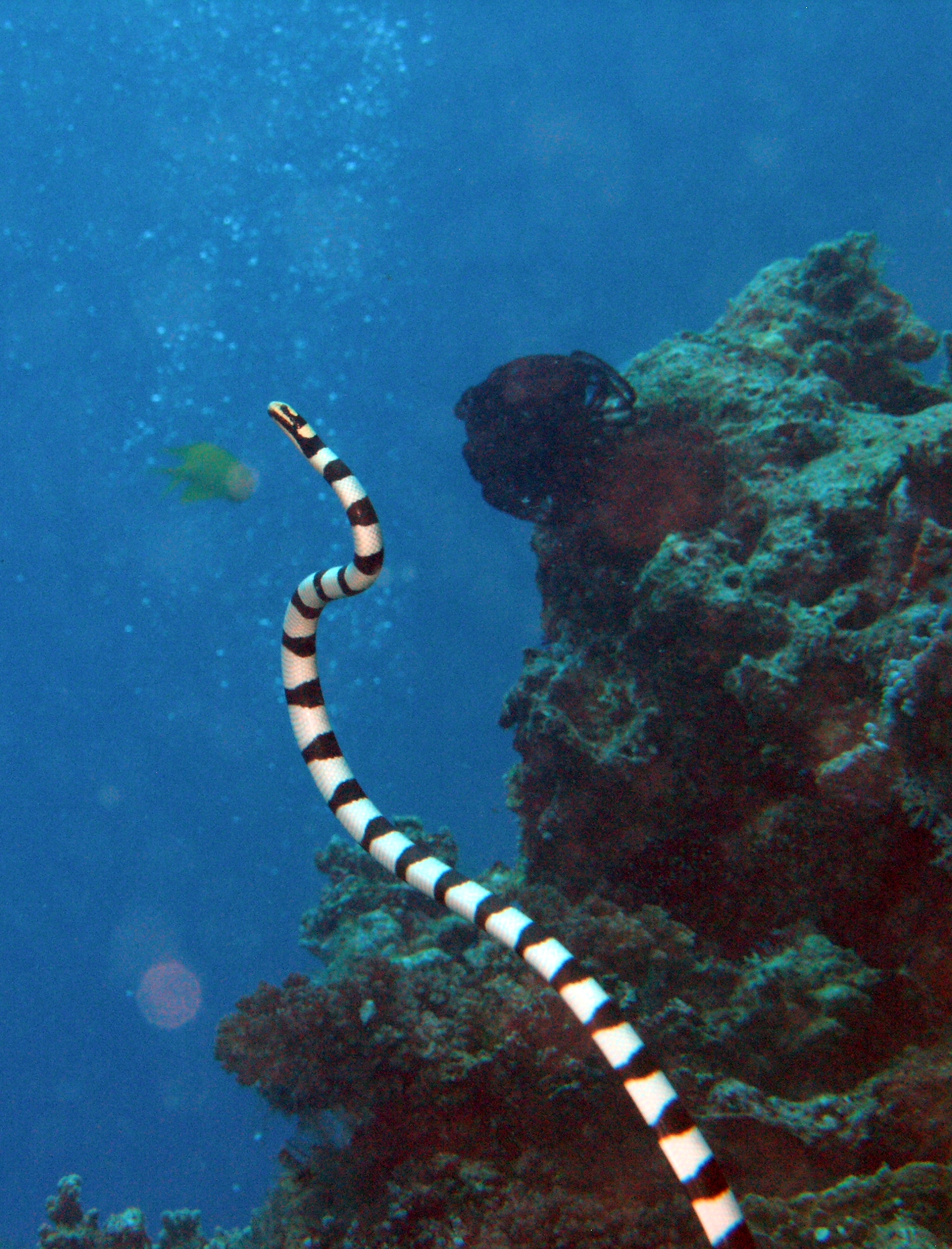 Banded sea snake (Laticauda colubrina). Fiji. 2008.